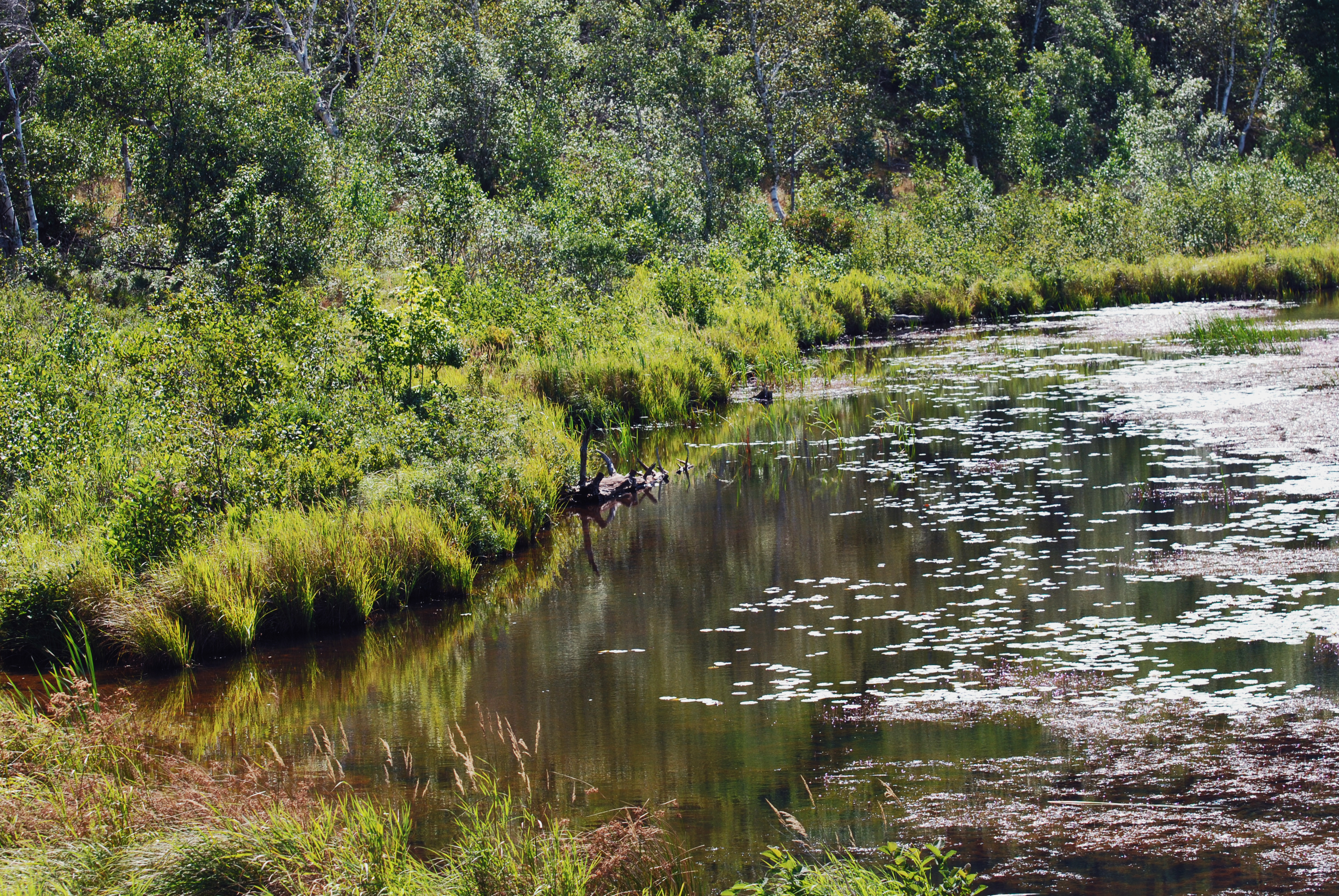 Beaver Pond